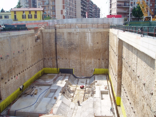 Il cantiere della costruenda stazione Volta all'arrivo della talpa.